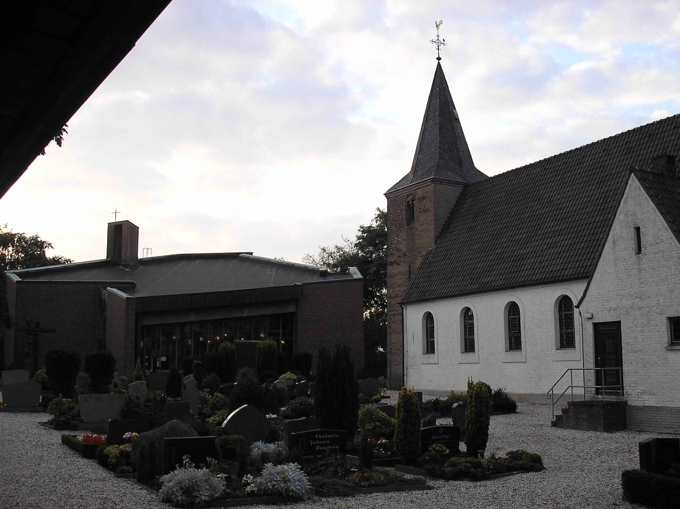 Kirchenensemble St. Johannes Baptist in Wyler, Gemeinde Kranenburg mit neuer und alter Kirche